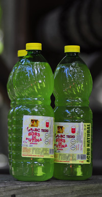 Un produs cunoscut, apreciat si premiat.